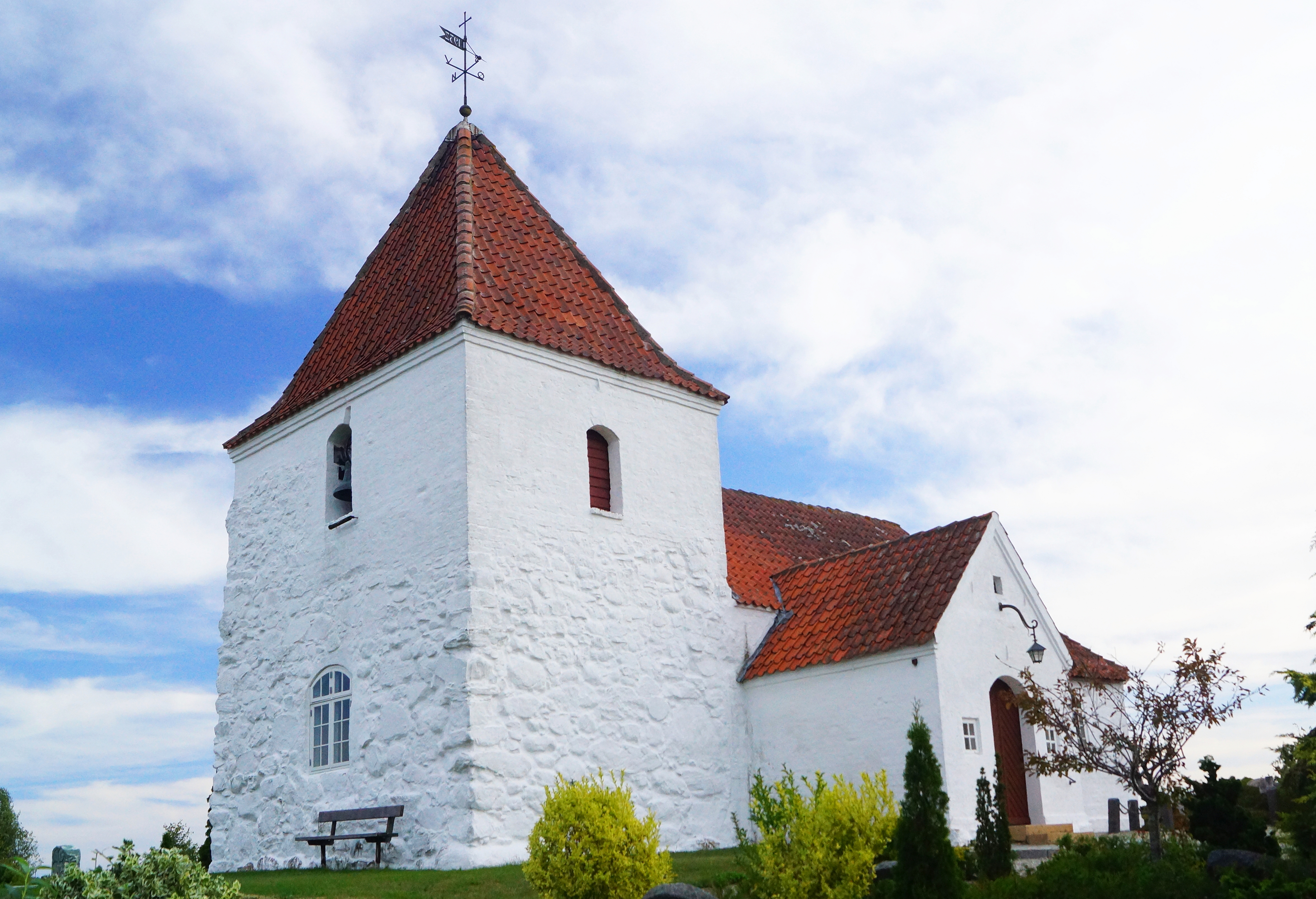 Udby Kirke